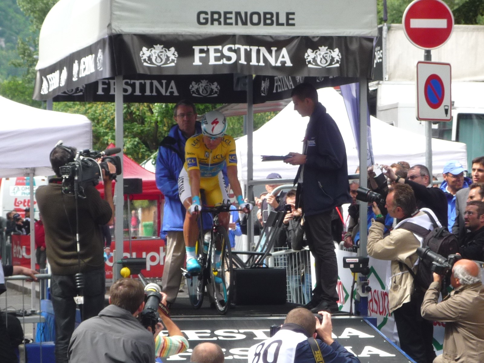 Alexander Vinokourov au départ du contre la montre Grenoble-Grenoble de la 3ème étape du critérium du Dauphiné 2011.